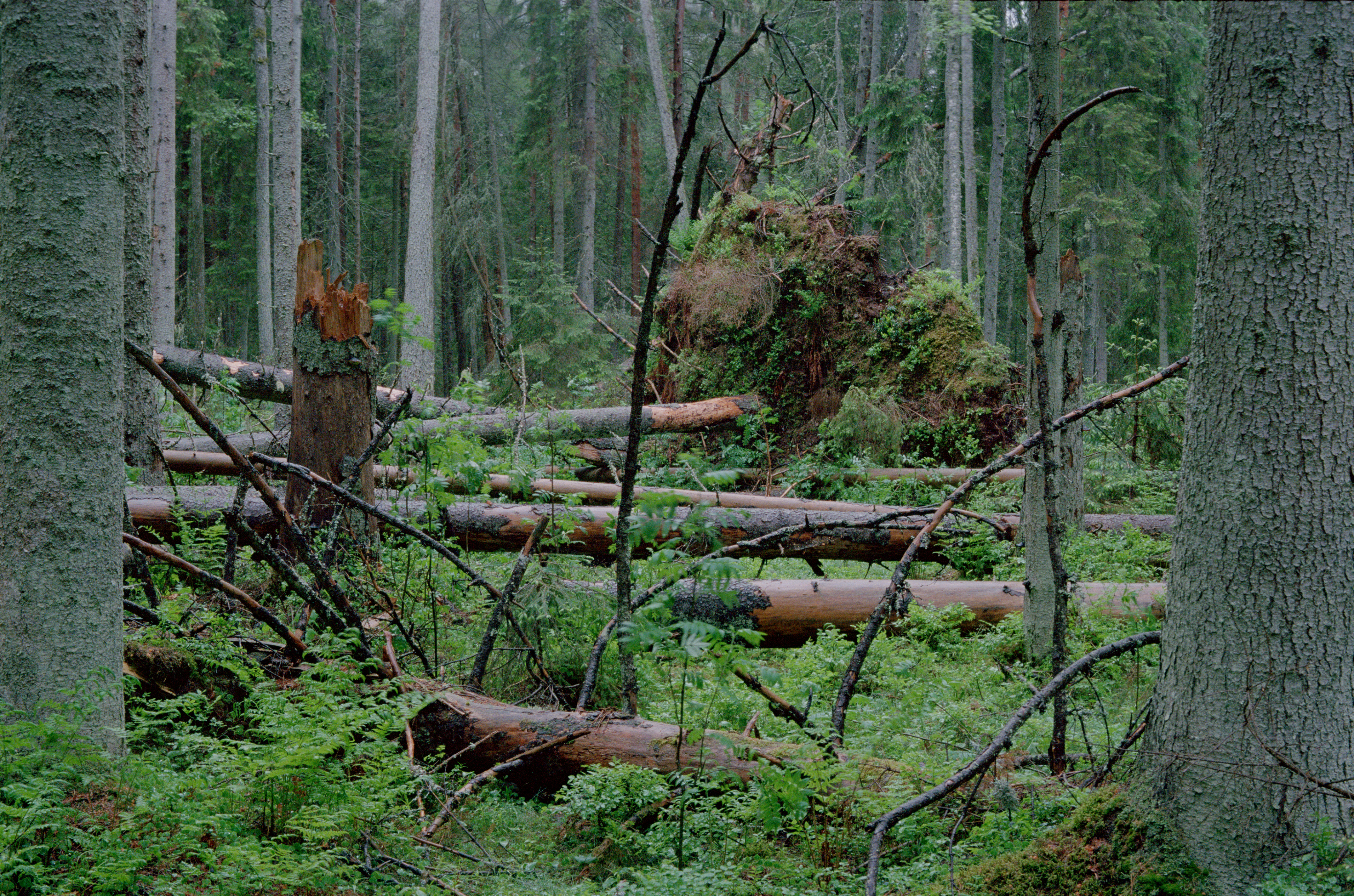 Oandu loodusmets Lahemaa rahvuspargis